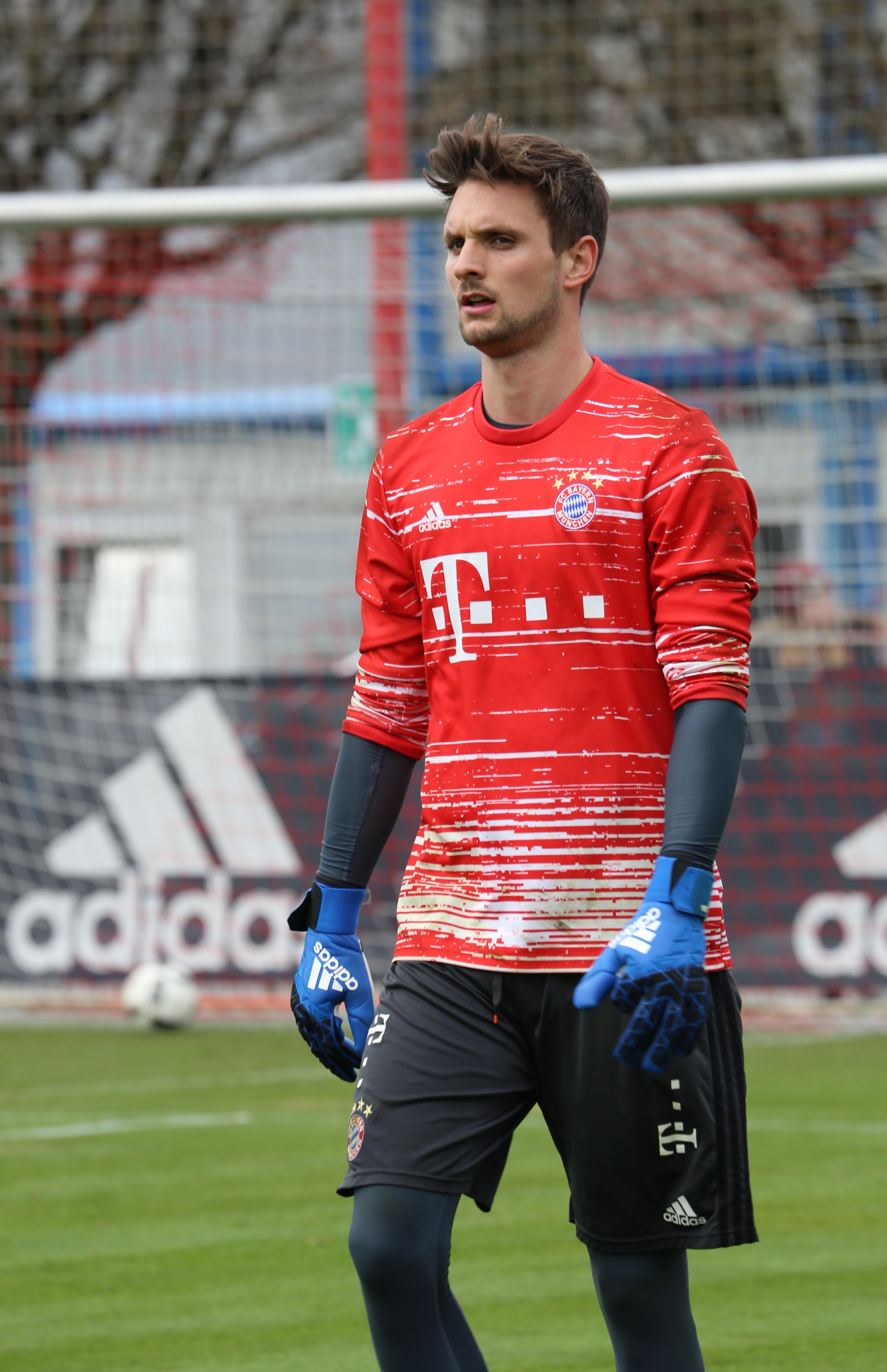 Sven Ulreich am 14. März 2017 beim Training auf dem Gelände des FC Bayern München